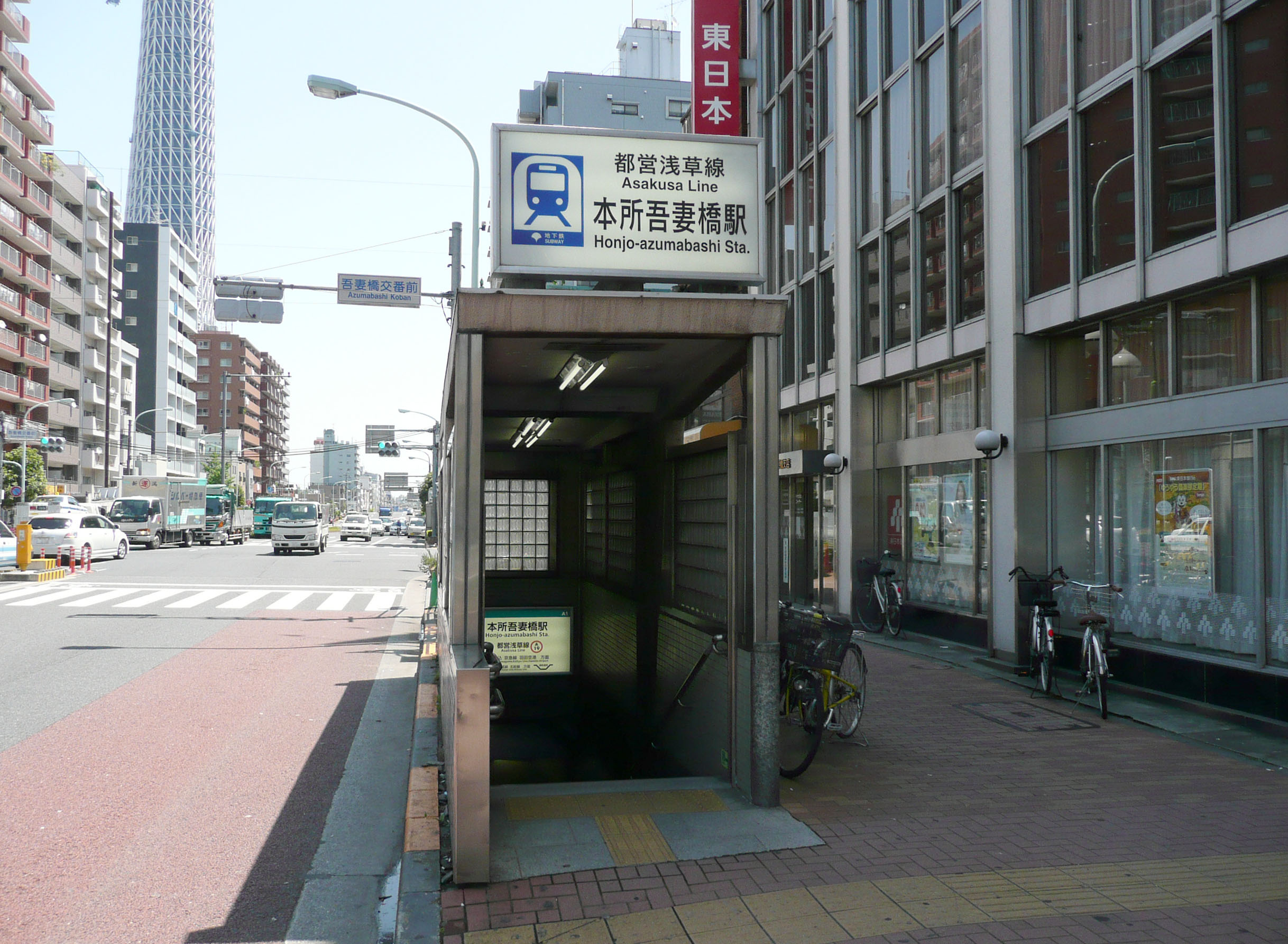 本所吾妻橋駅A1出入口